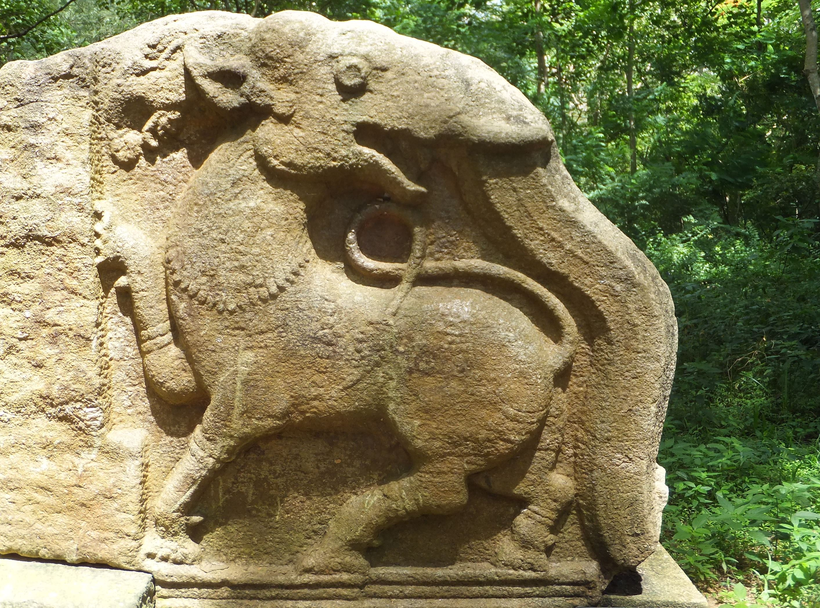 සිංහල: කුරුණෑගල රාජකීය පරිශ්‍රයේ ඇති ක්‍රි.ව.14වන සියවසට අයත්කොරවක්ගල